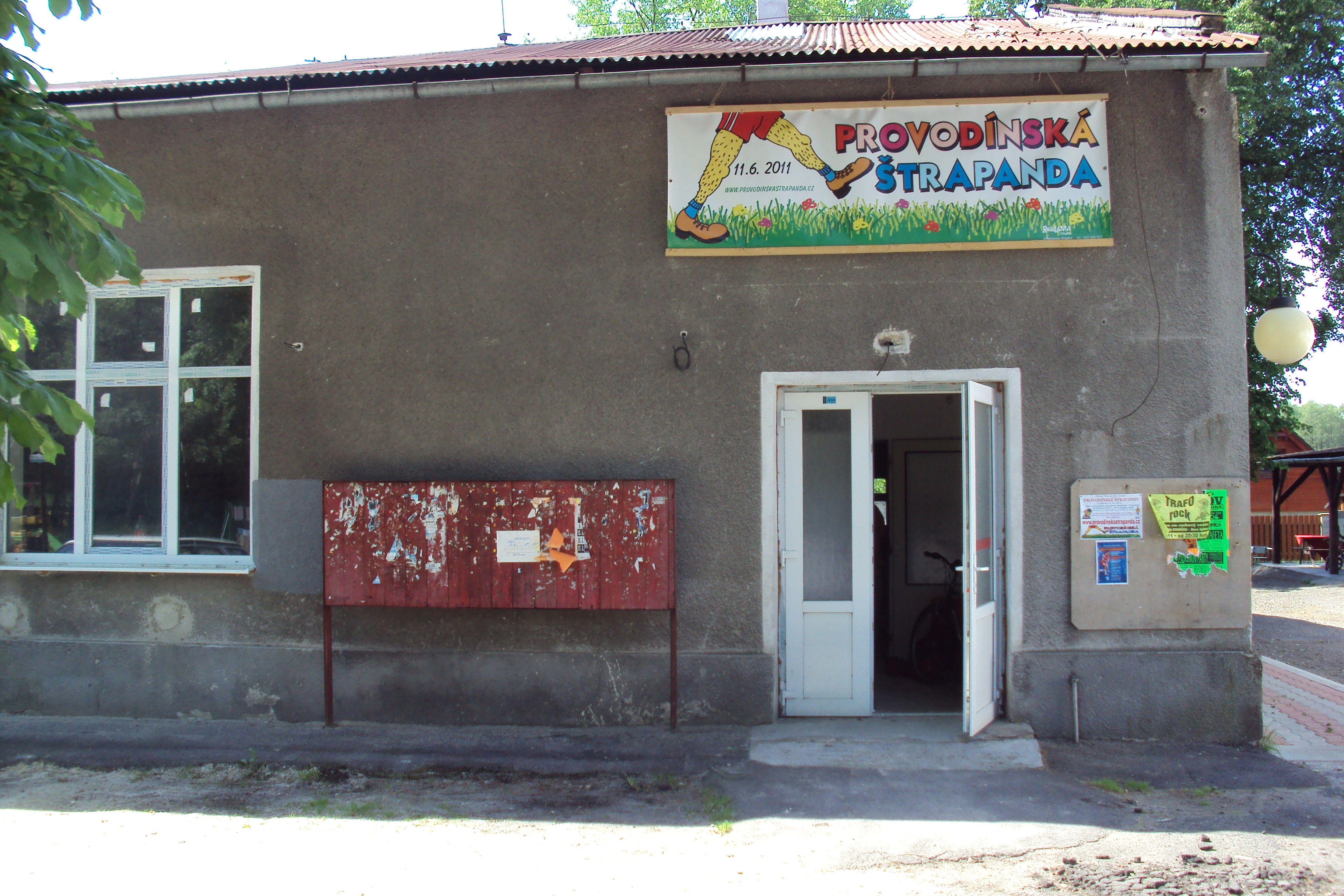 Propagační oznámení připravené turistické akce